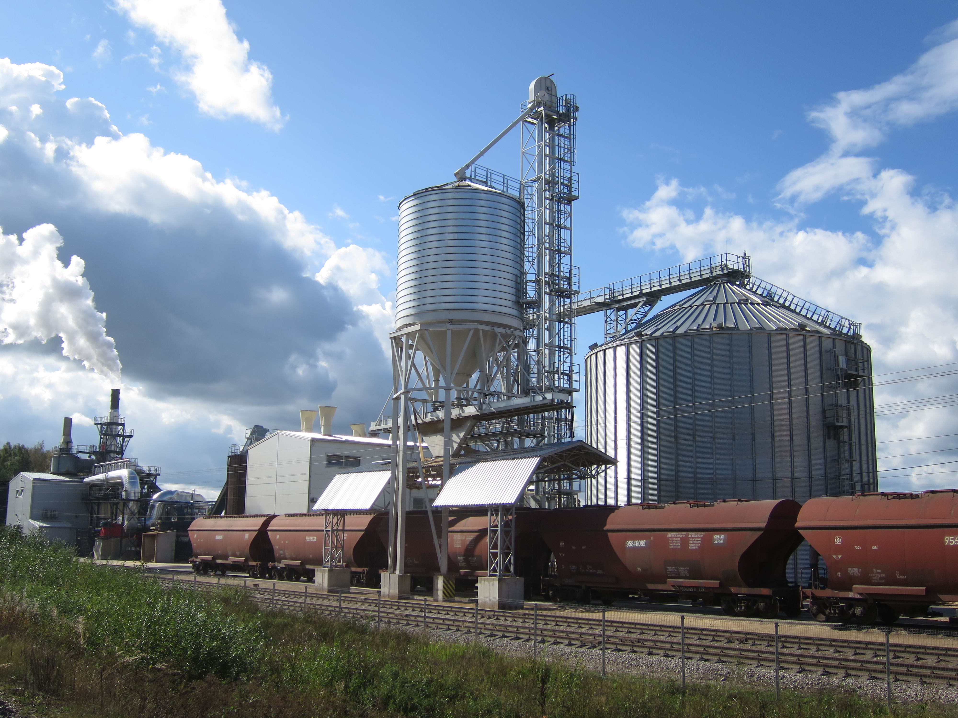 Granulu rūpnīca netālu no Gulbenes